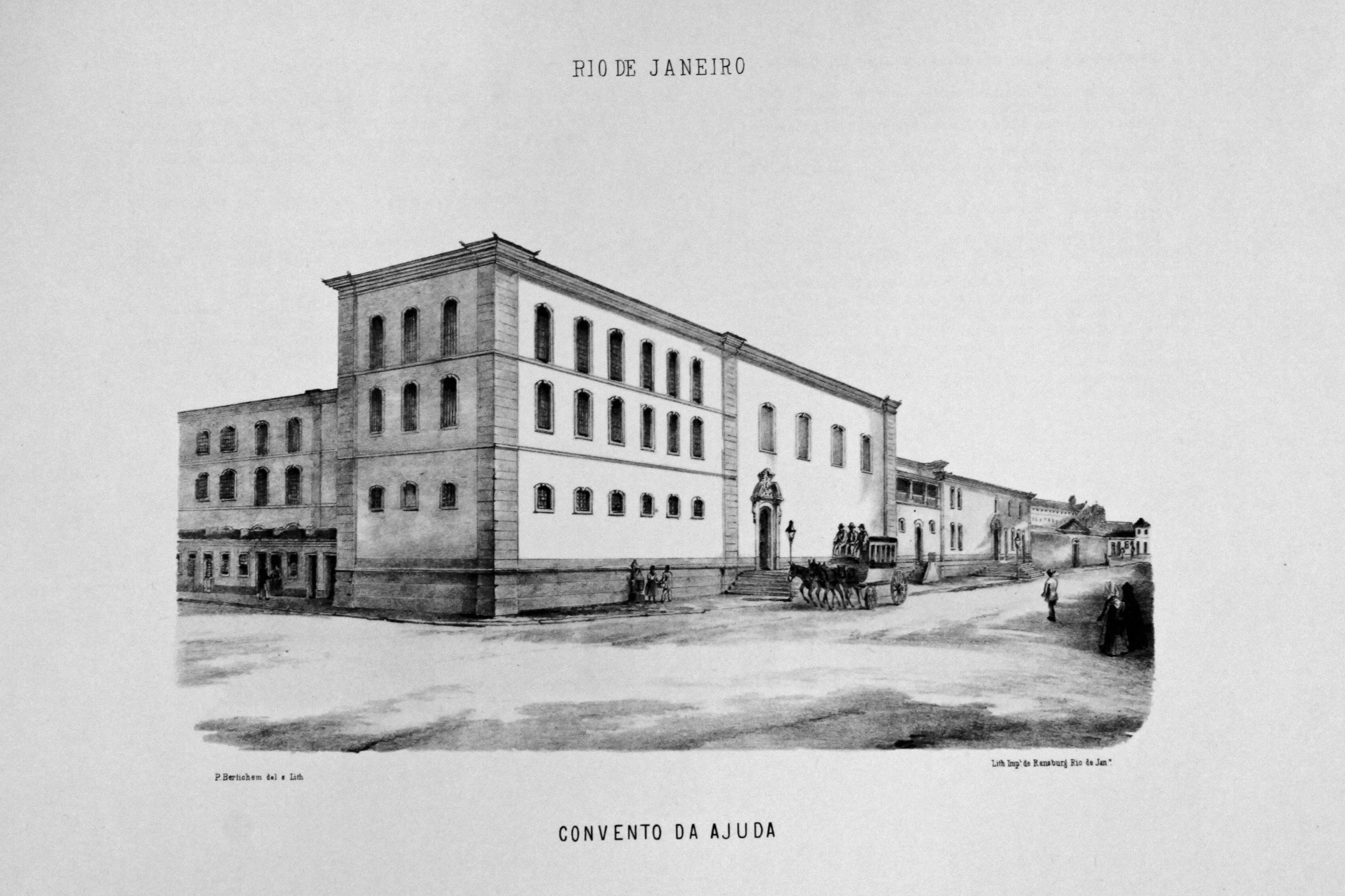 P. G. Bertichem - Antigo Convento da Ajuda na Cinelândia